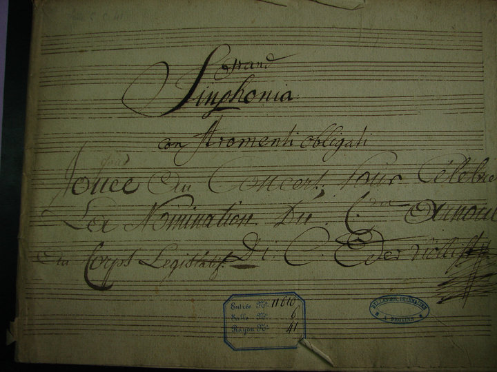 Page de garde du manuscrit de l'une des symphonies de Eder, conservée dans son intégralité au Fonds ancien e la Ville de Provins, Villa Garnier